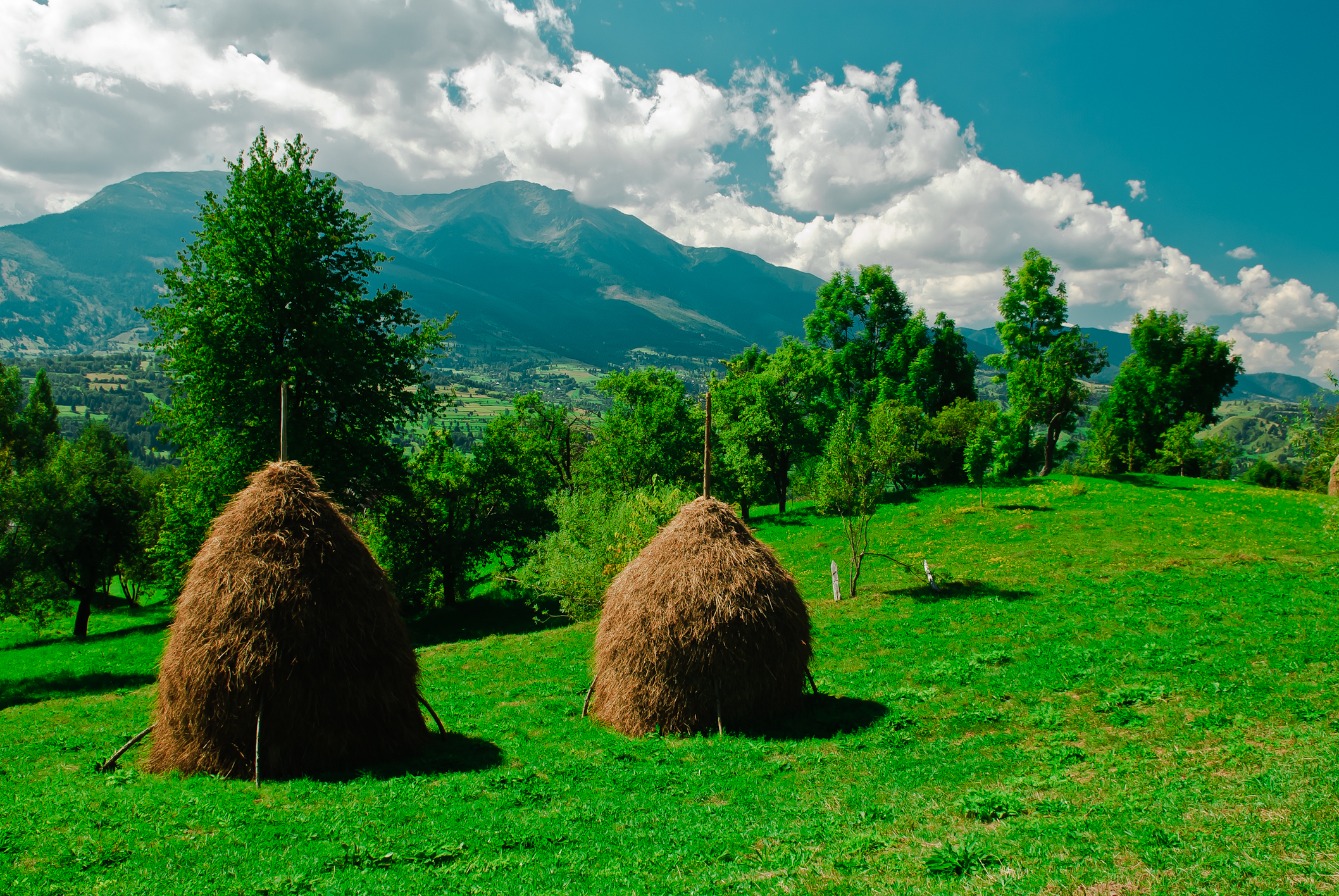 Peisaj de munte.